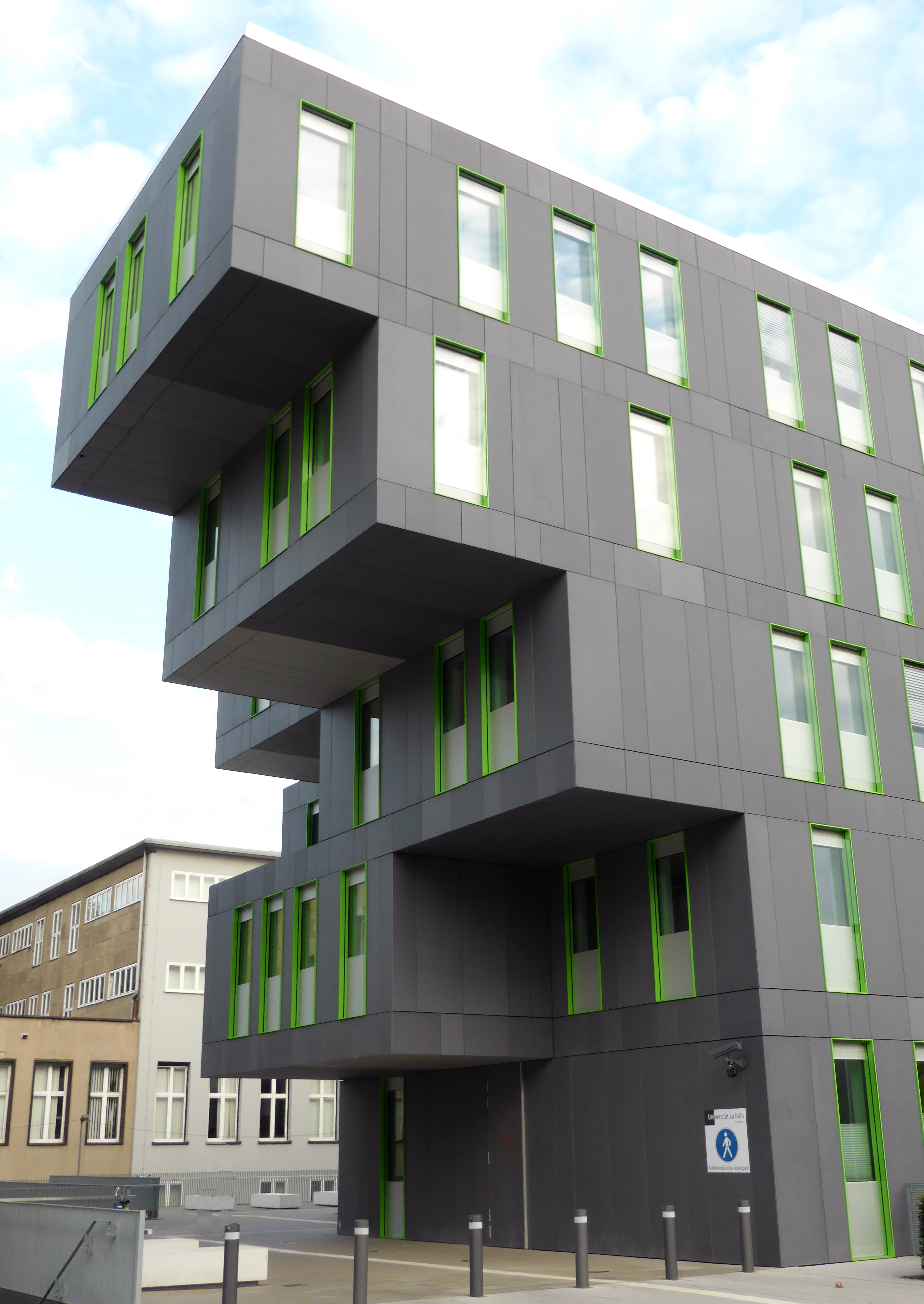 Universität zu Köln Gebäude 102 (Universitätsstraße 22a) - Studierenden Service Center (SSC).